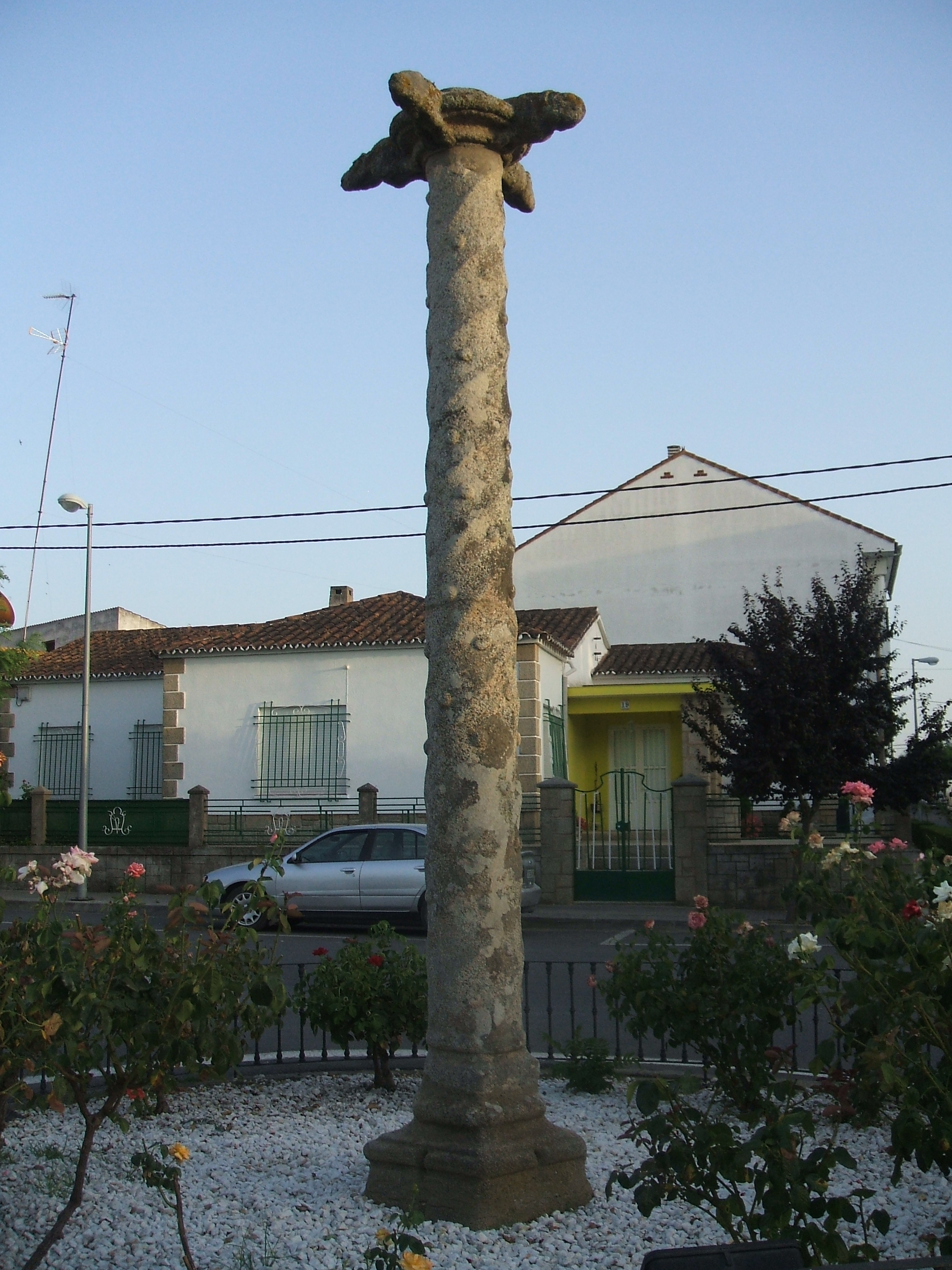 En Ceclavín (Cáceres) se conserva en perfecto estado el rollo jurisdiccional de la villa. Su estilo es Manuelino. Consta de basa, fuste (decorado con bolas entre helicoides) y cuatro brazos en cruz figurando cabezas animales.